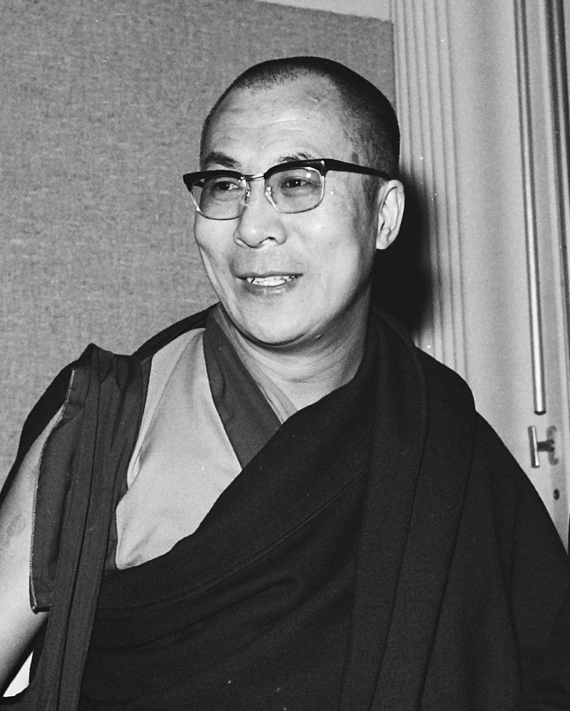 Collectie / Archief : Fotocollectie Anefo Reportage / Serie : [ onbekend ] Beschrijving : Kardinaal Alfrink ontvangt Dalai Lama Datum : 8 oktober 1973 Trefwoorden : kardinalen, ontvangsten Persoonsnaam : Alfrink, Bernardus, Dalai Lama Fotograaf : Mieremet, Rob / Anefo Auteursrechthebbende : Nationaal Archief Materiaalsoort : Negatief (zwart/wit) Nummer archiefinventaris : bekijk toegang 2.24.01.03 Bestanddeelnummer : 926-7355